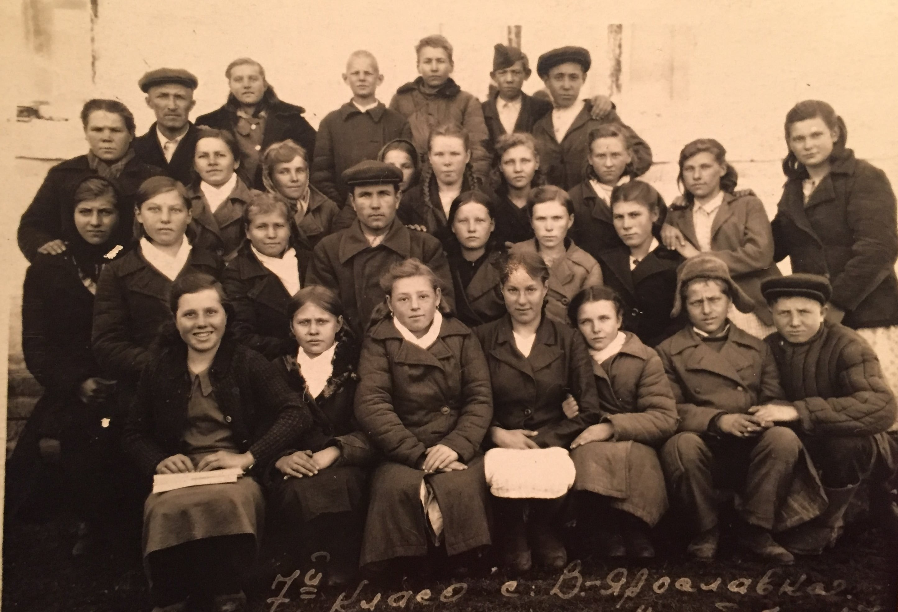 Ученики 7 класса Верхнеярославской НСШ, 1947 год